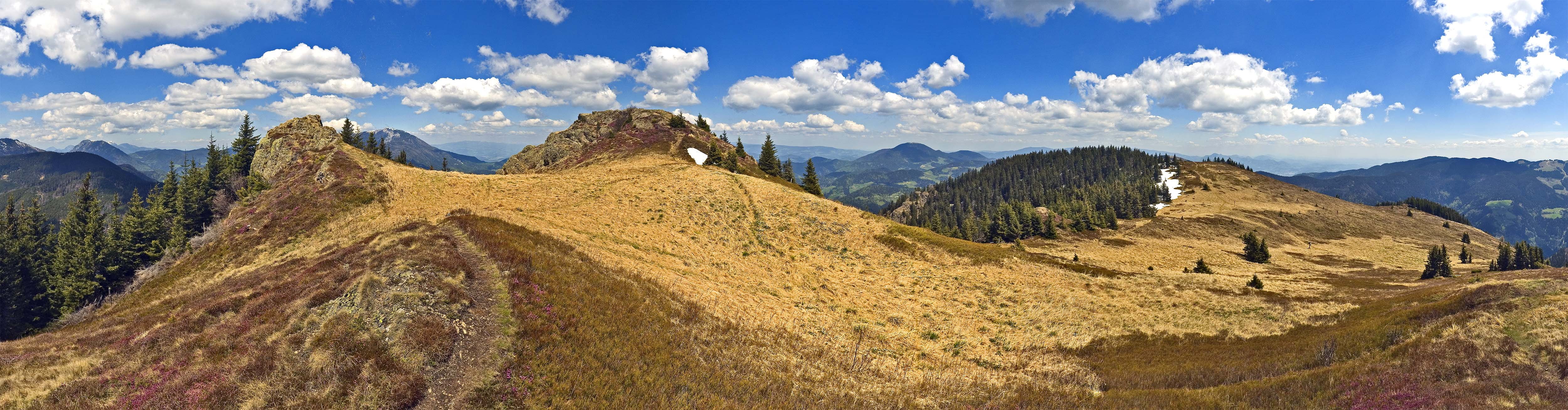 Vrh Komna s skalnatima vrhovoma - na desni strani panorame, v daljavi je predalpska planota Golte. Komen je najvišji vrh Smrekovškega pogorja. Avtor: Boštjan Burger (datum fotografije: maj 2008)